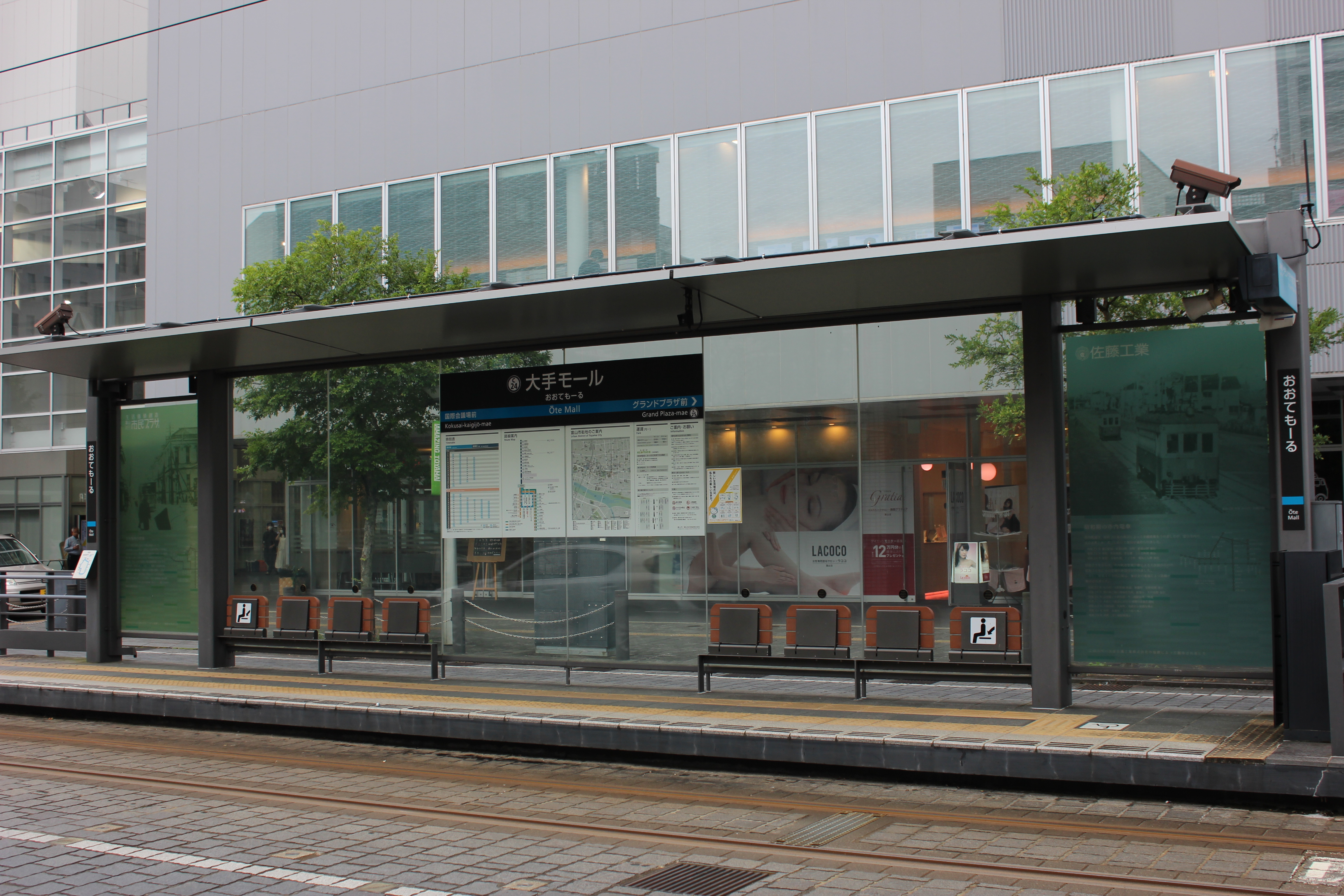 大手モール停留場（富山県富山市）